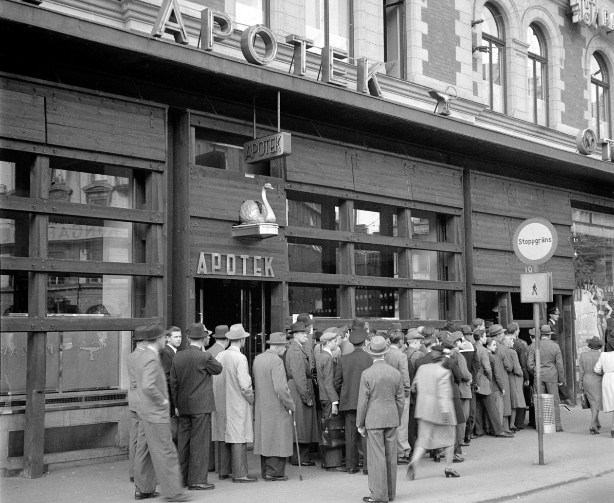 Stureplan 19, Apoteket Svanen. Lång kö till tobaksbutik bredvid p.g.a. ny ransoneringsperiod och att de munstyckslösa cigaretternas poängvärde sänkts.